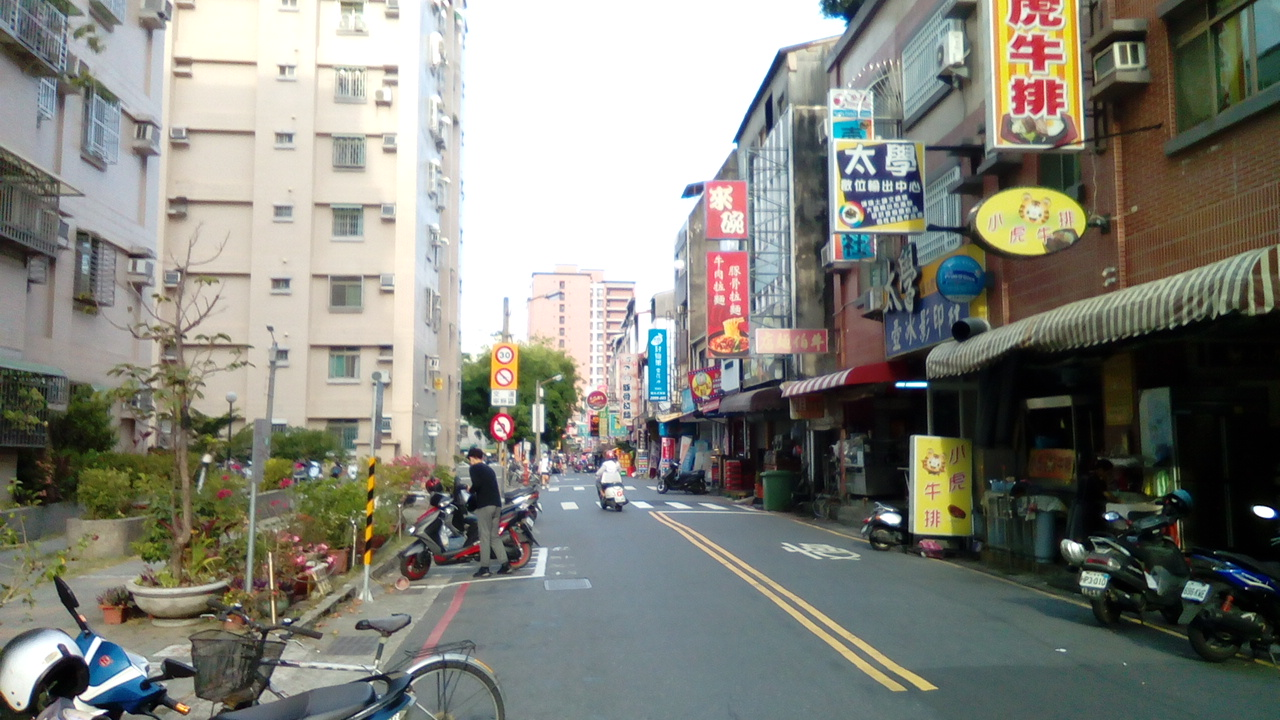 同上 位於台南市東區育樂街 後火車站